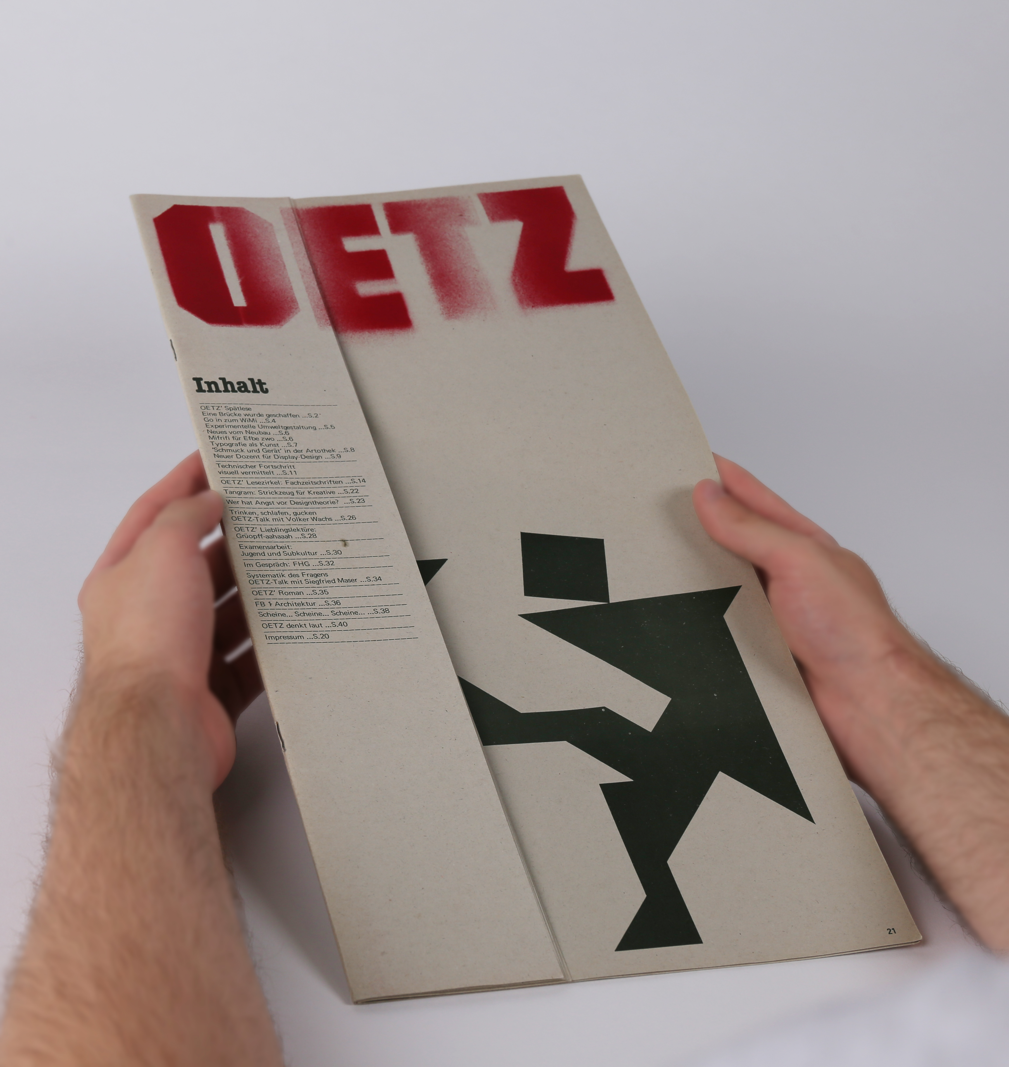 Titelseite der ersten OETZ-Ausgabe mit der Ausgabennummer 0